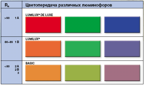 таблица цветопередачи люминесцентных ламп